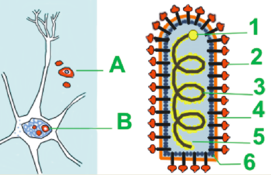 Representação esquemática do vírus da raiva:A - Corpúsculos de Negri livres;B - Corpúsculos de Negri em célula nervosaO vírus:1 - RNA polimerase (proteínas L e P)2 - Glicoproteína3 - Cadeia do RNA4 - camada de lipídio5 - Nucleocápside proteica6 - Matriz proteica.